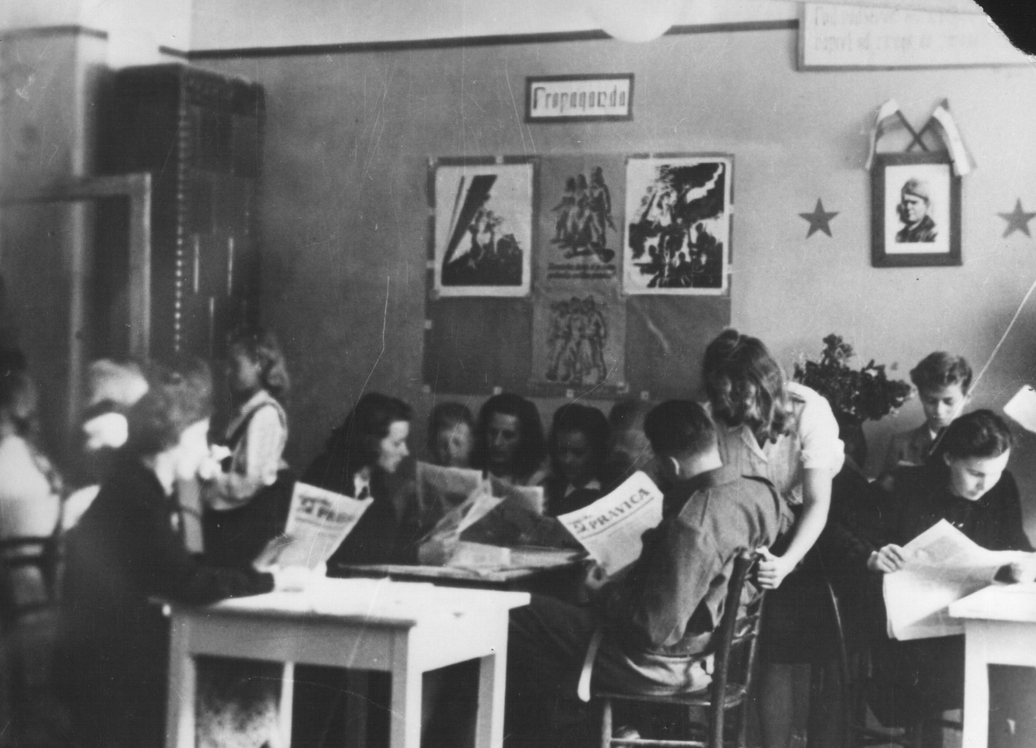 Mladinska čitalnica v Metliki.